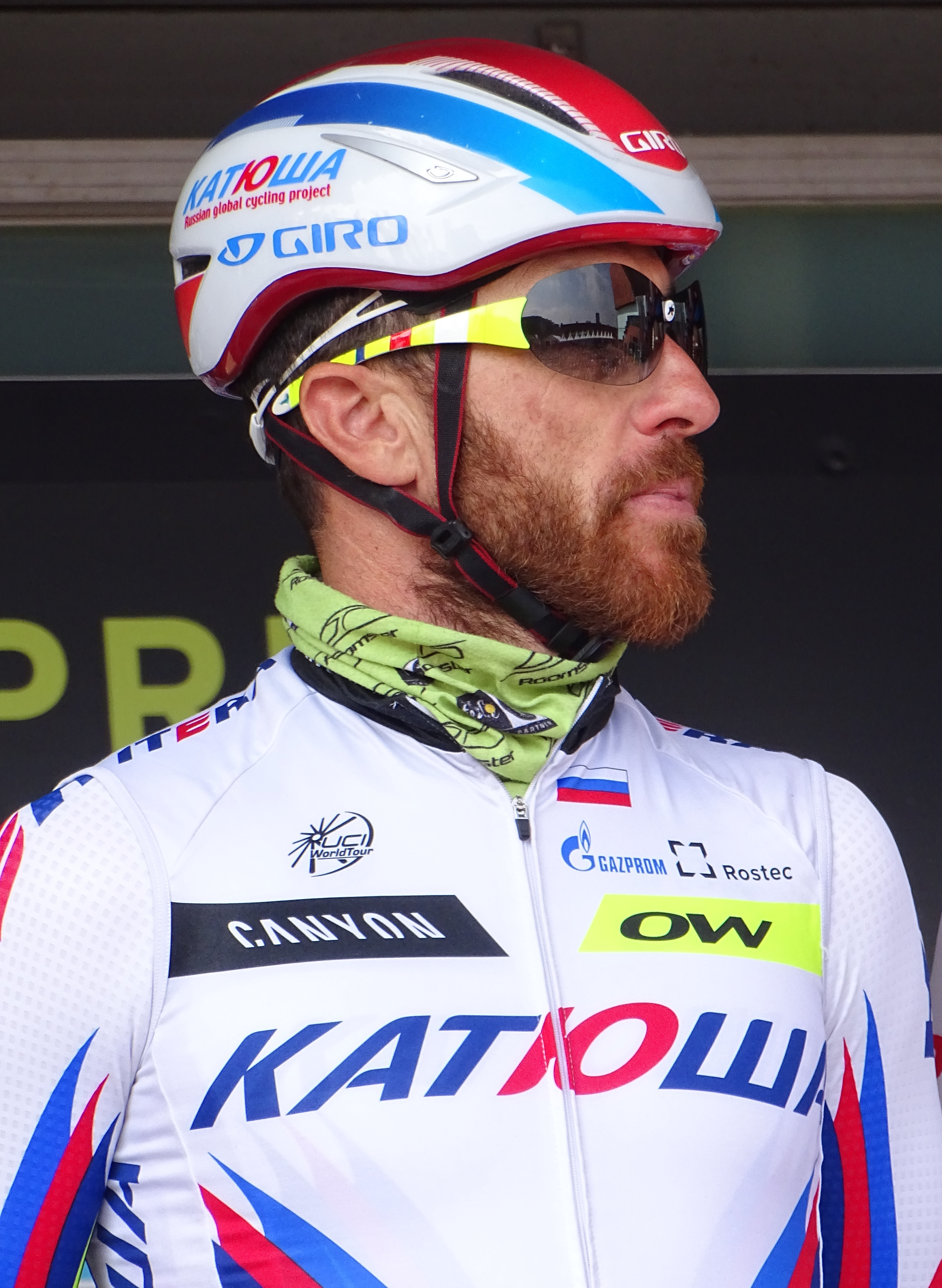 Reportage réalisé le mercredi 8 avril à l'occasion du départ du Grand Prix de l'Escaut 2015 à Anvers, Belgique.